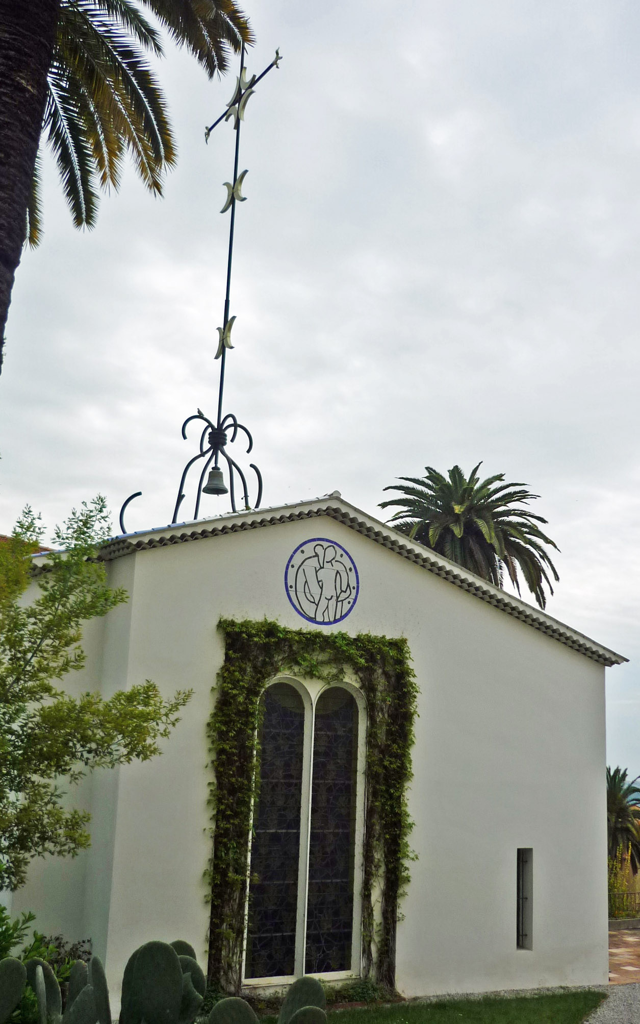 Rosarienkapelle in Vence